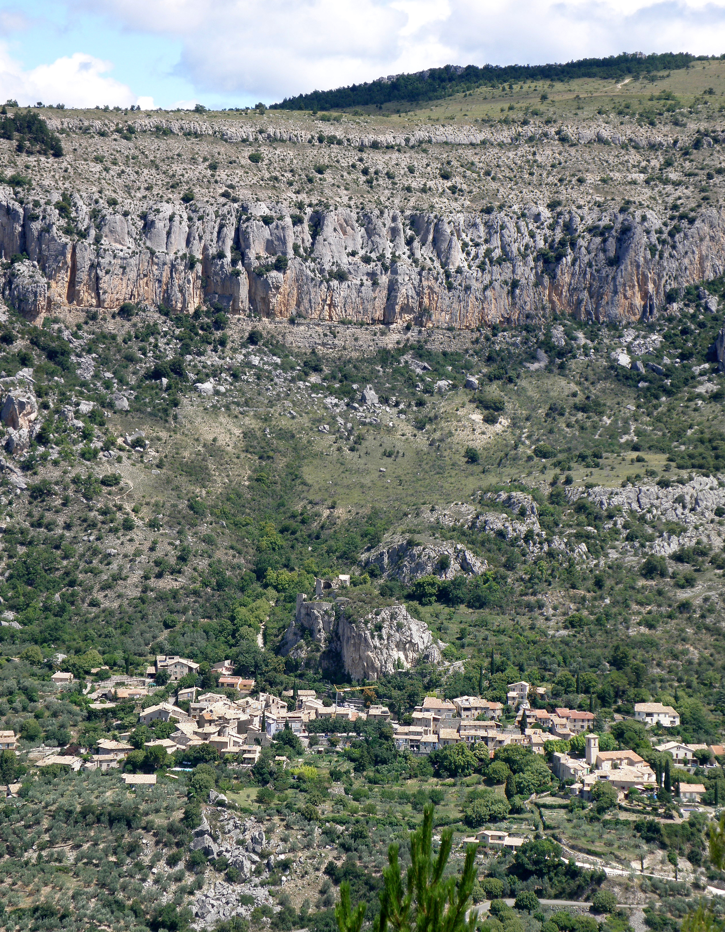 La Roche-sur-le-Buis (Drôme, France). Vue d'ensemble.